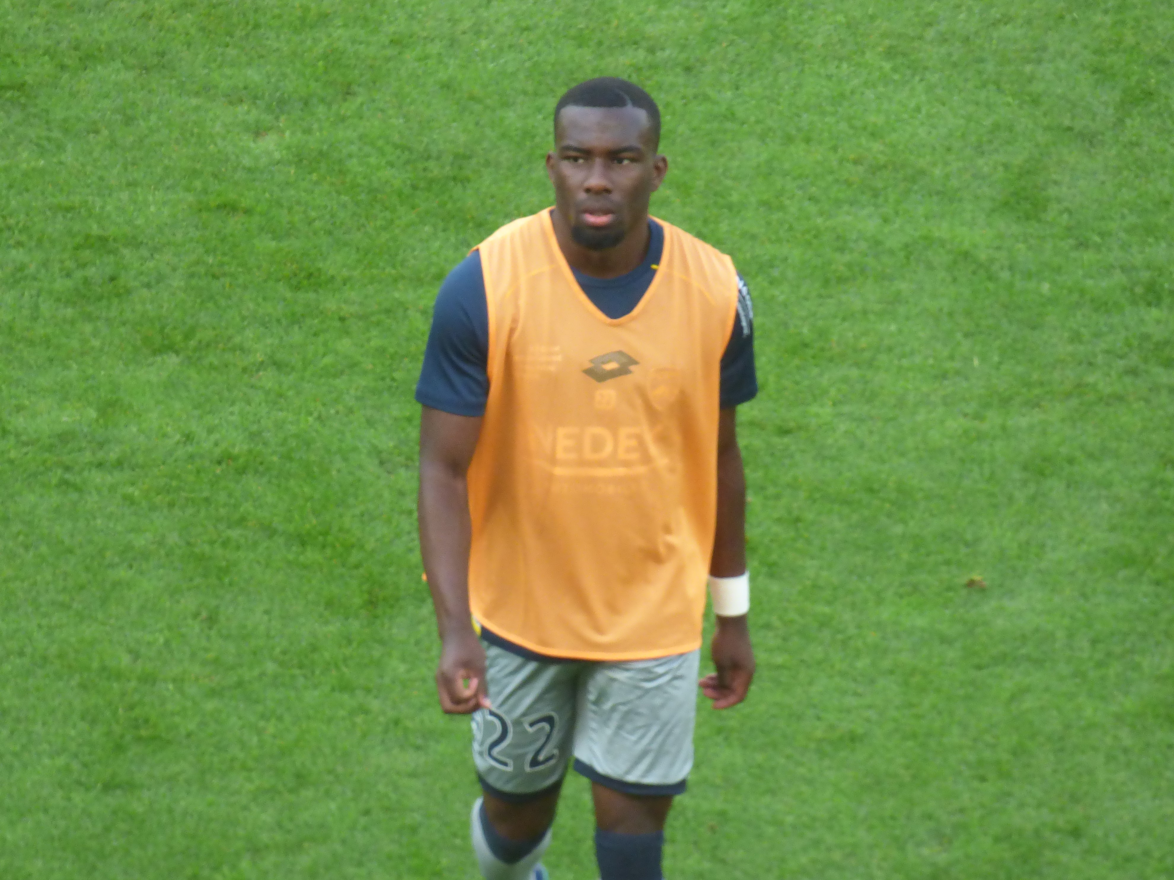 Salem Mbakata avant le match Lens / Sochaux, comptant pour la septième journée du championnat de France de football de Ligue 2, le 15 septembre 2018.